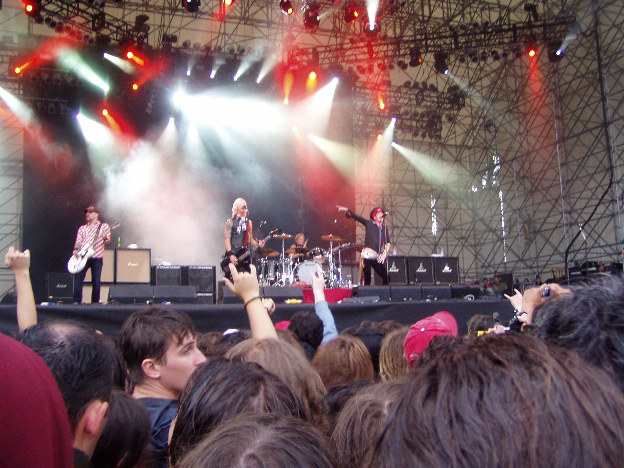 I Velvet Revolver al Gods of Metal 2007